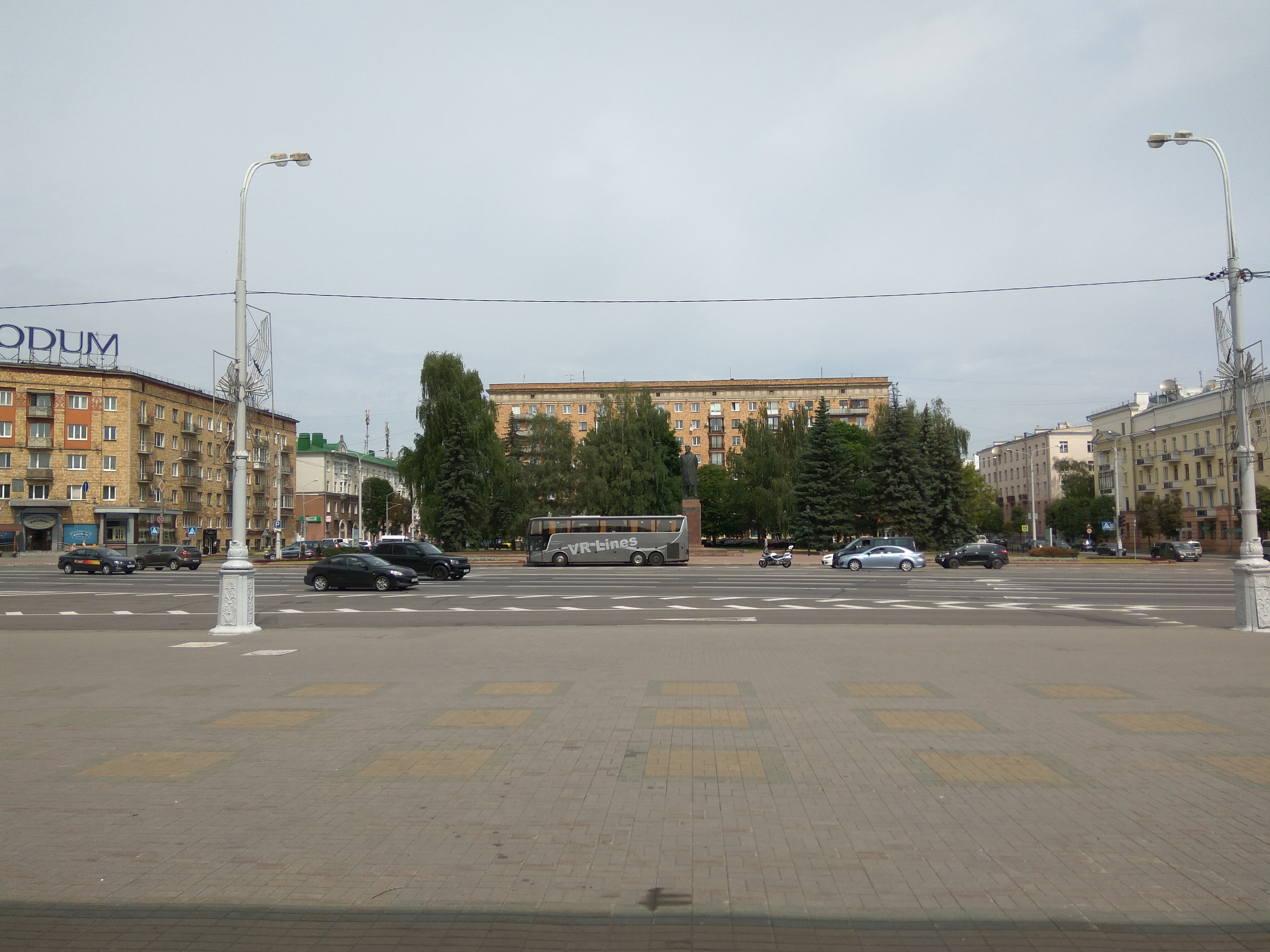 Мінск. Плошча Калініна (2018)